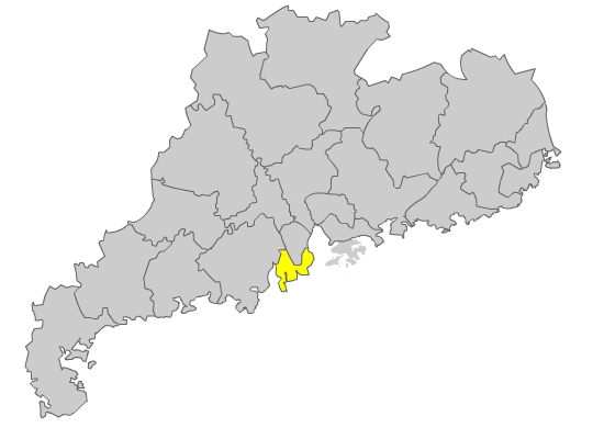 内容介绍：珠海在广东的位置 原创者：zhuwq 创作日期：2005年1月 创作方法：将广东地图用扫描仪输入电脑，再将图片导入FLASH，用画笔描出轮廓，着填充，导出JPG图像。 zhuwq授权，任何人都可以使用